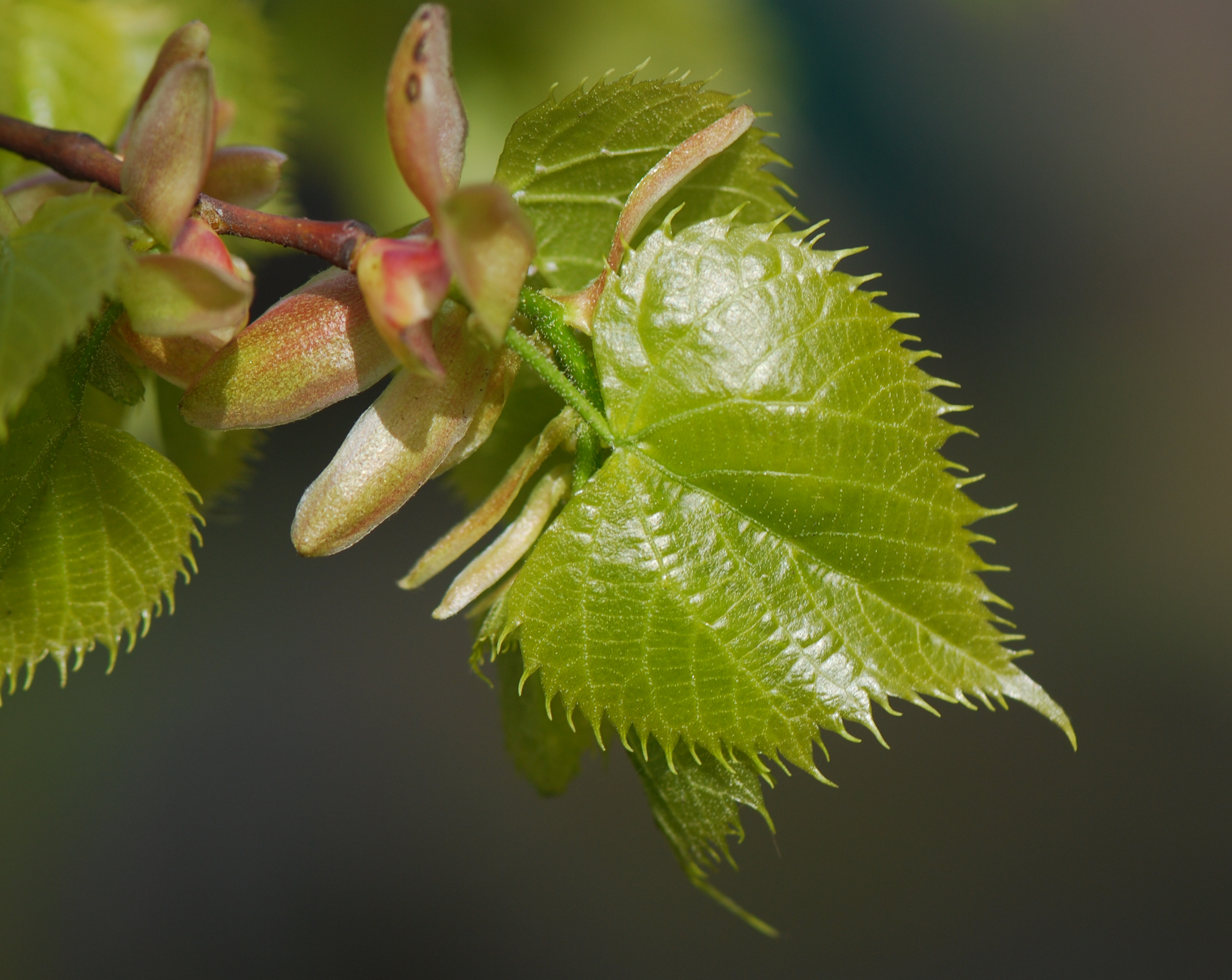 jeune feuille